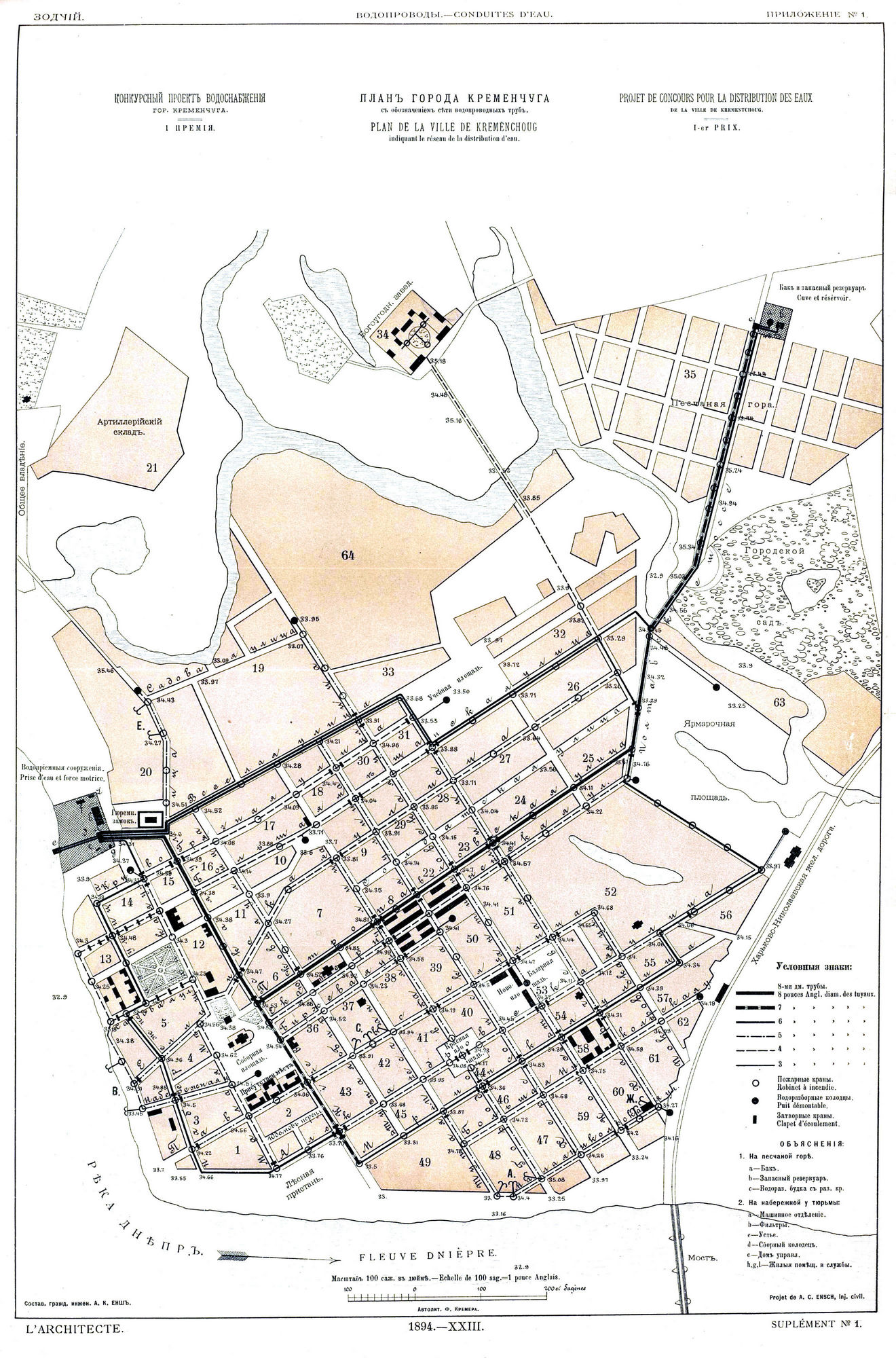 Енш А.К. Проект водоснабжения города Кременчуг, 1894. Первая премия на конкурсе.